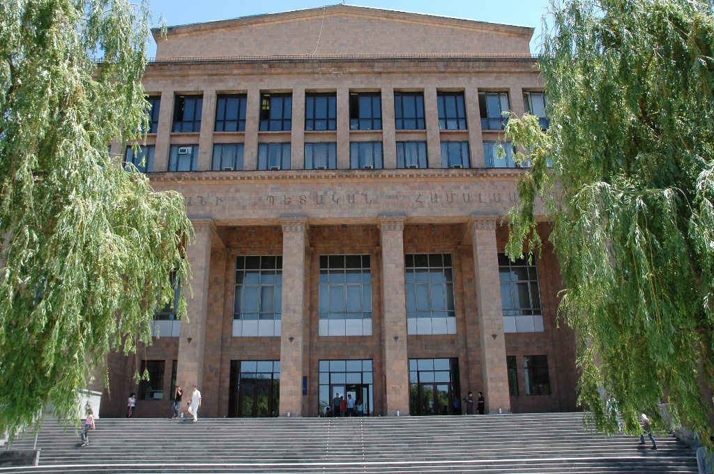 Bâtiment de l'université d'État d'Erevan, Arménie